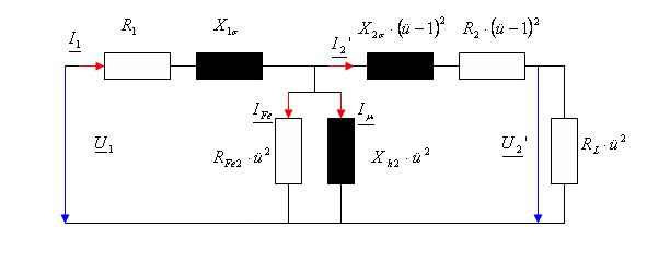 Vereinfachtes Ersatzschaltbild vom Spartransformator. Dabei ist zu bedenken, dass es vom Hauptersatzschalbild mathematisch abgeleitet wurde.